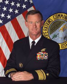 Portrait von Rear Admiral William H. McRaven, USN, Commander des US Special Operations Command Europe